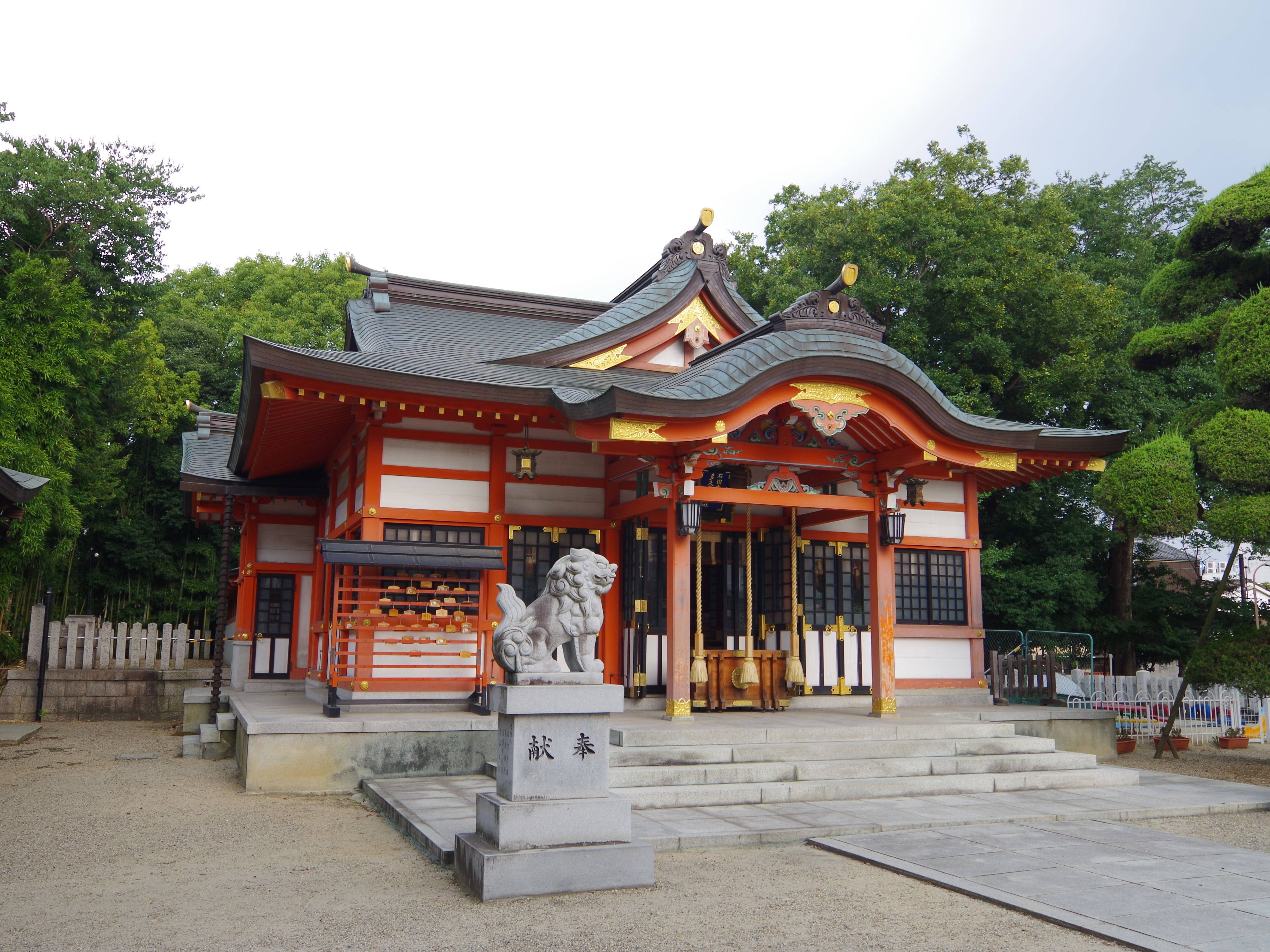 石園坐多久虫玉神社 大和高田市片塩町 Isono-ni-masu-takumushitama-jinja 2013.8.16